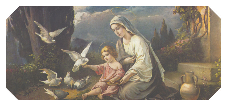 Taubenmadonna